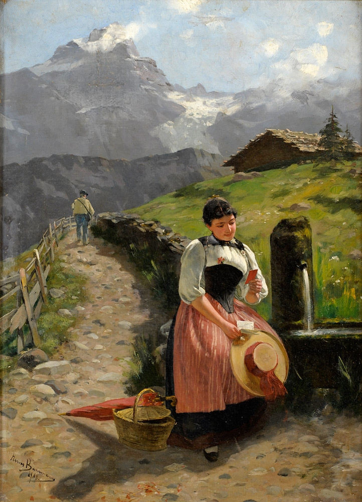 Das Foto vom Liebsten. Signiert. Datiert 1888.